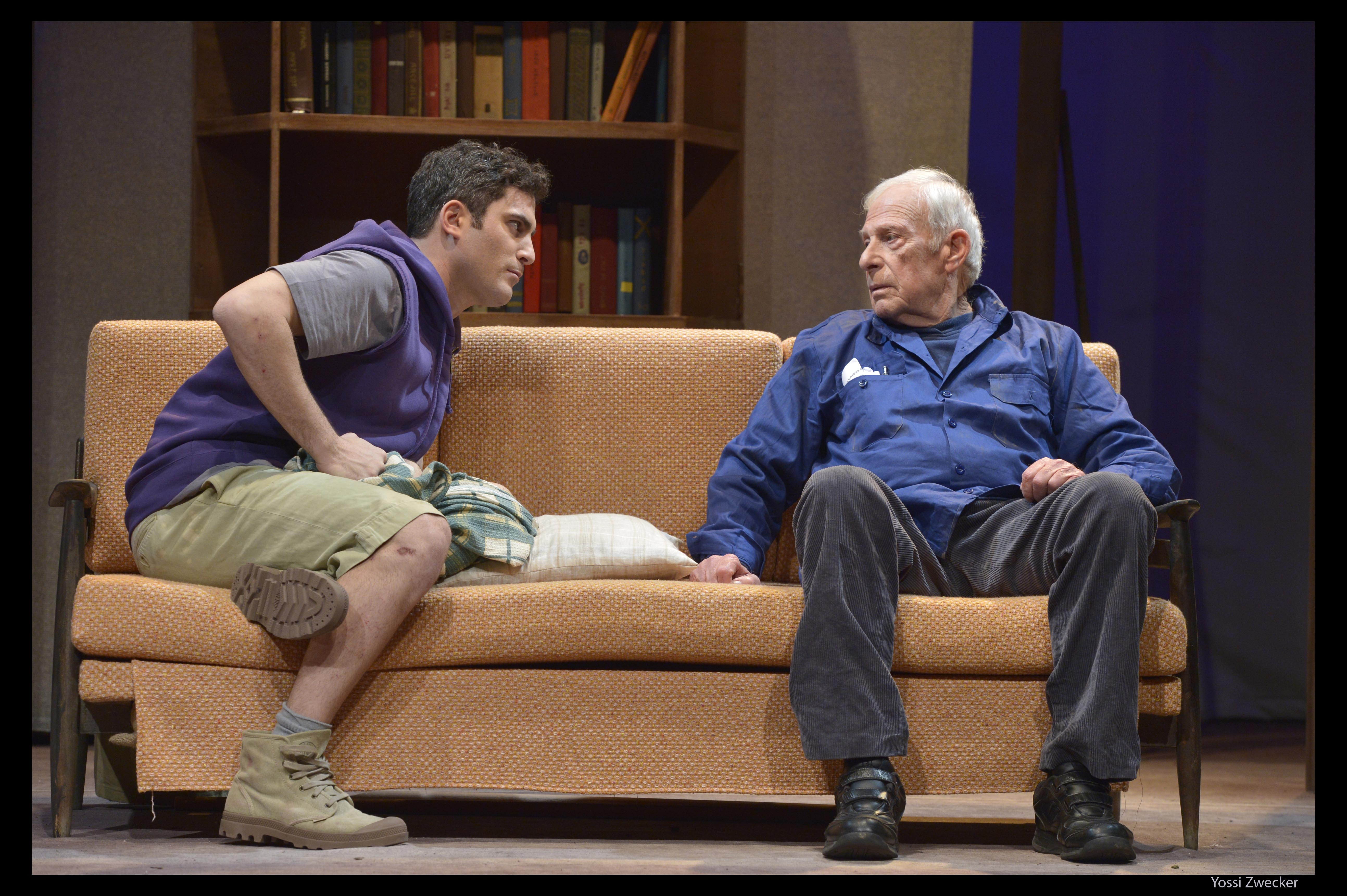 אלכס פלג ואודי פרסי בהצגה "הבחירה" של תיאטרון אורנה פורת לילדים ולנוער.